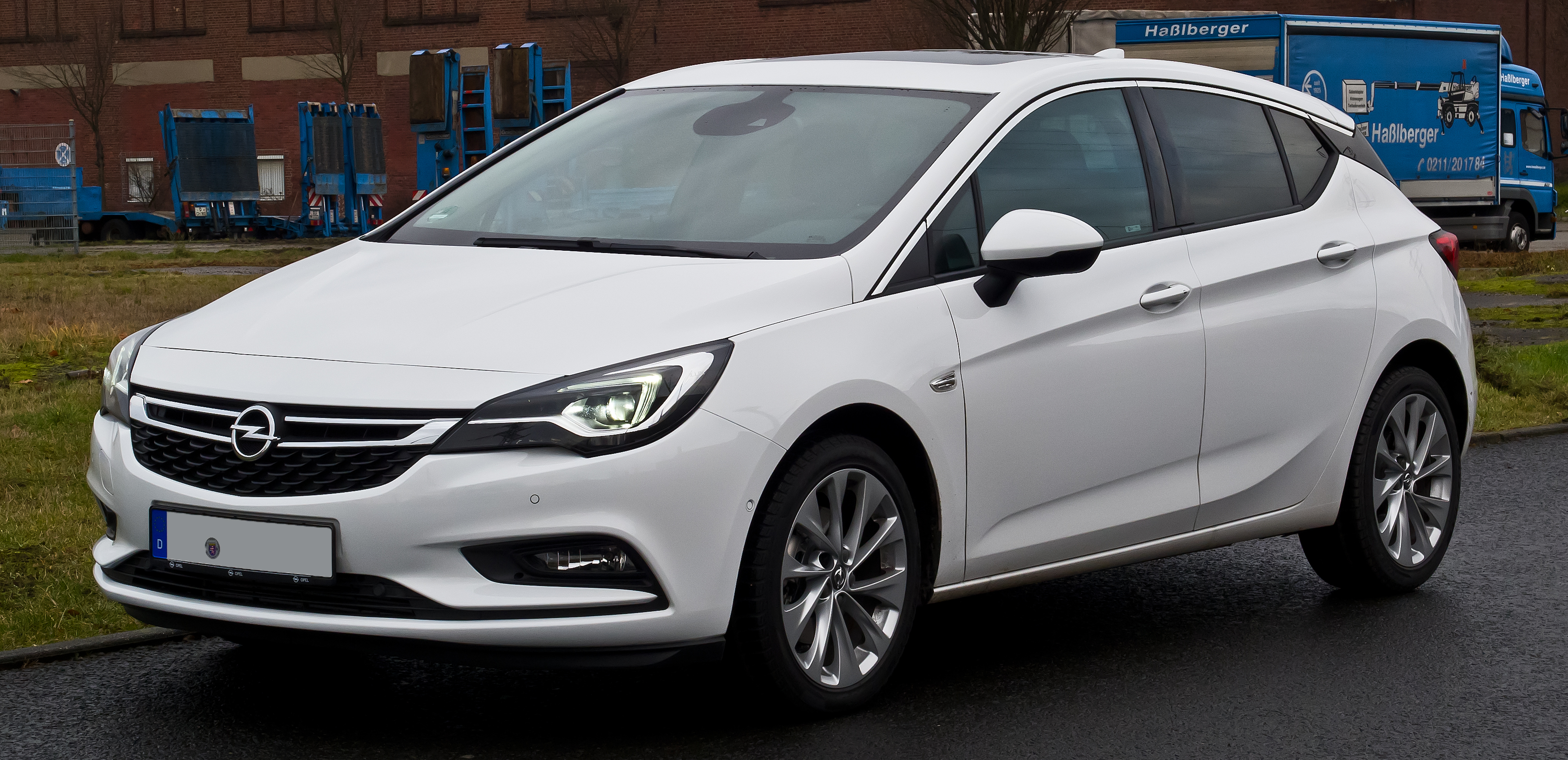 Opel Astra 1.6 CDTI ecoFLEX Dynamic (K)